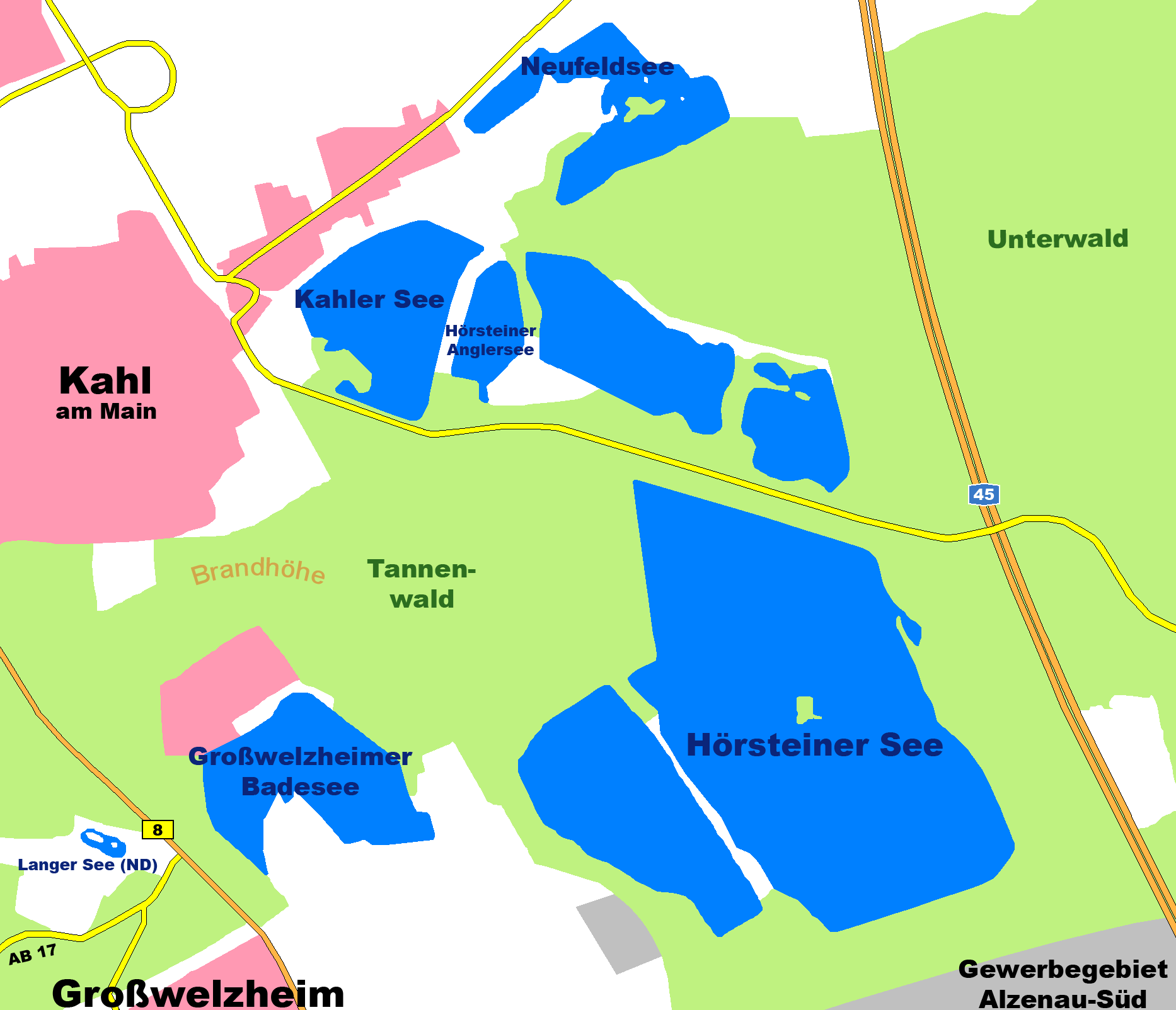 Die Vorspessartseen bei Kahl am Main Grünfläche, Wiesen Siedlungsfläche Industriefläche Wald Gewässer Bundesstraße Hauptstraße